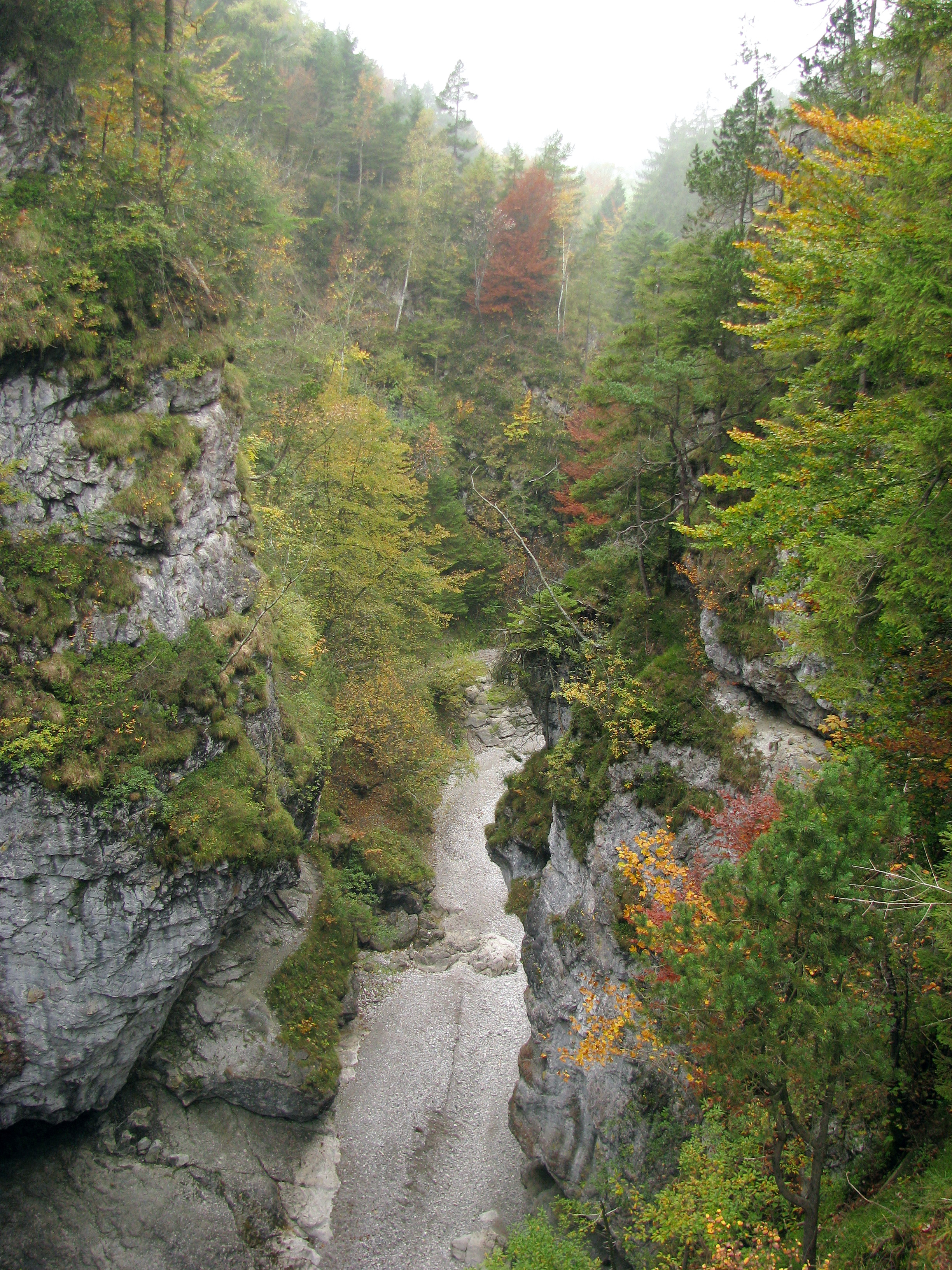 Asamklamm, Blick von der Brücke nach Südosten in die Schlucht